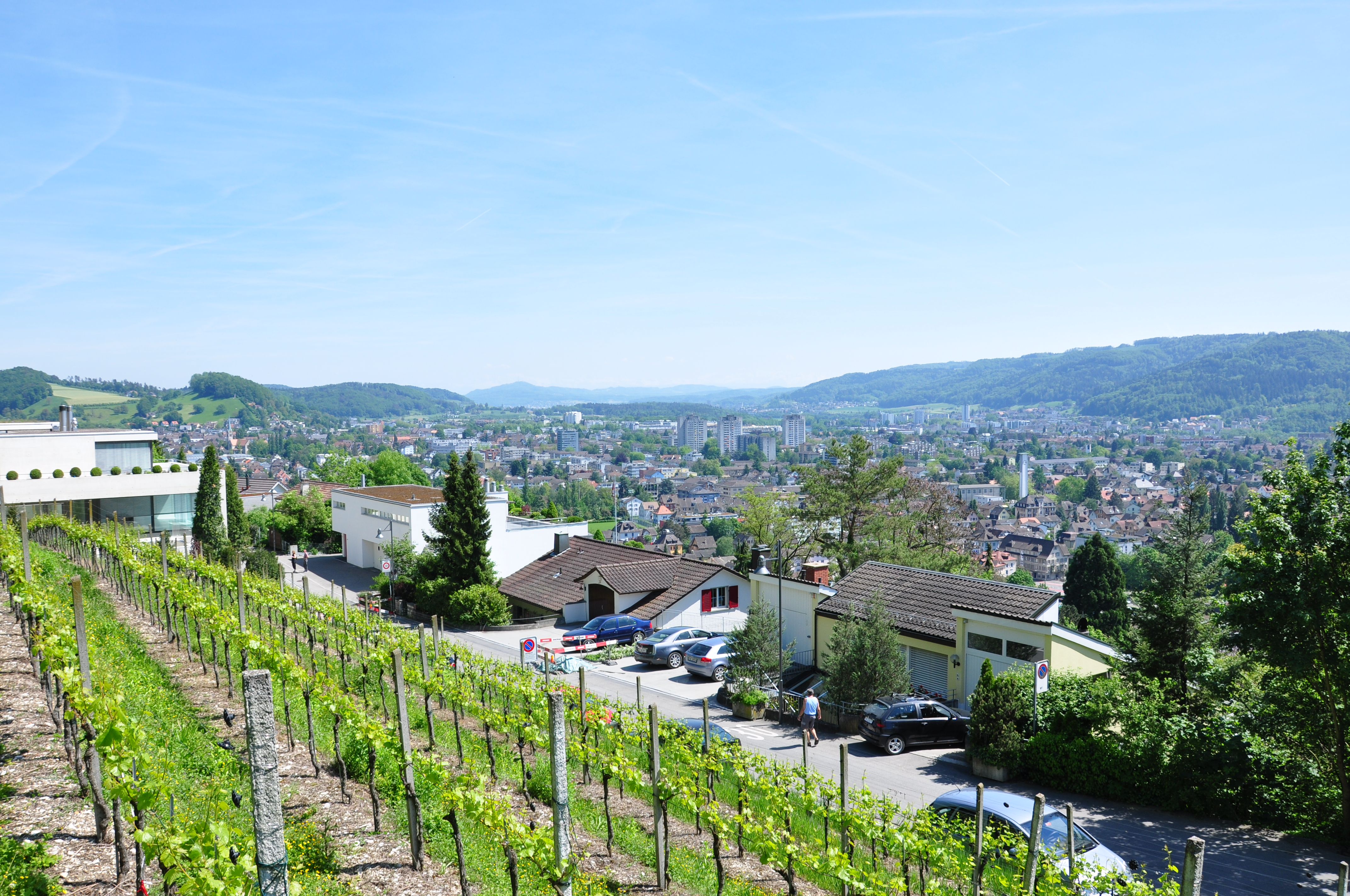 Limmattal towards Wettingen as seen from Schartenfels in Wettingen (Switzerland)